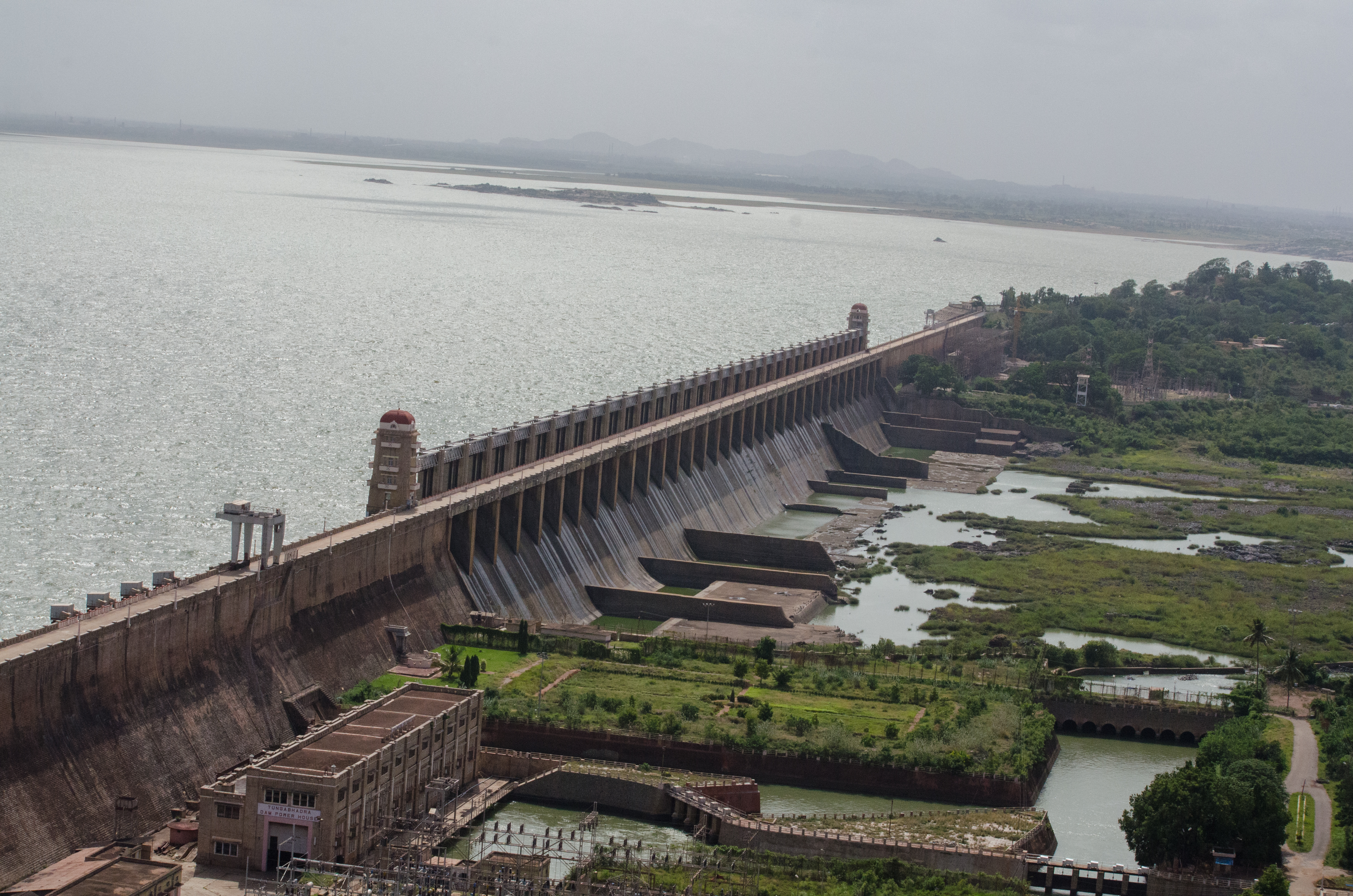 Tungabhadra Dam